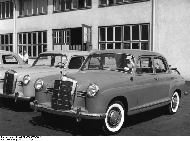 Daimler-Benz A.G. Werk Sindelfingen Mercedes Typ 190